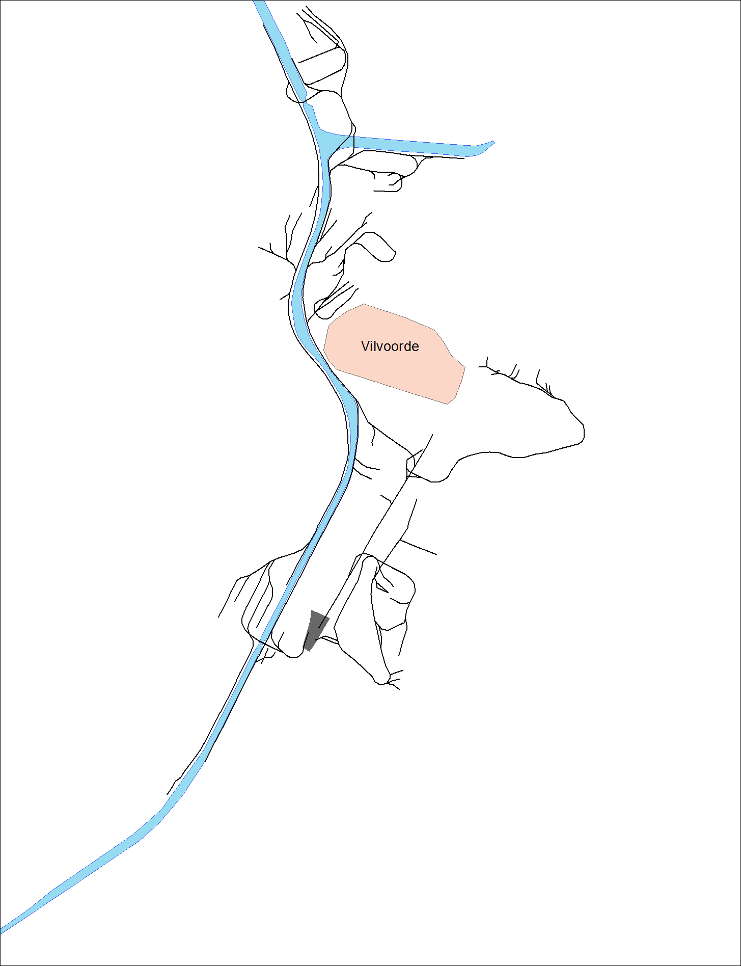 Maximale uitbreiding van het netwerk van de Chemin de Fer Industriel rond Vilvoorde. De spoorwegen op deze kaart zijn allen afgeleid van de topografische kaarten van het MCI, MGI en NGI. Dit sluit niet uit dat de CFI in zijn bestaansgeschiedenis nog andere trajecten heeft uitgebaat die niet weergegeven zijn op deze kaart.